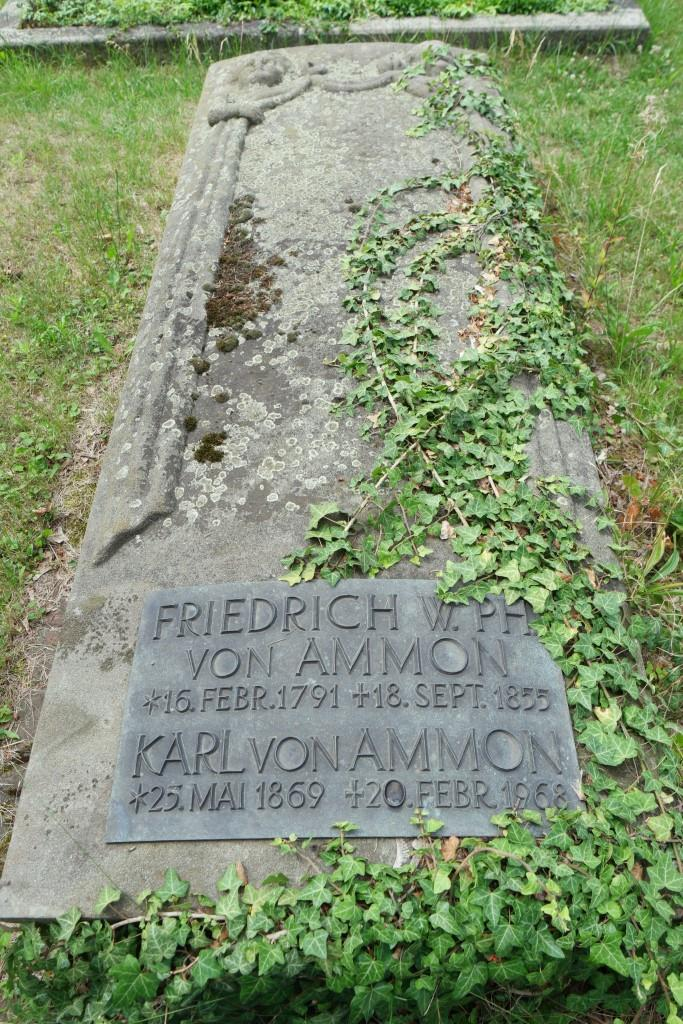 Grab des Theologen Friedrich von Ammon, 1791-1855, auf dem Neustädter Friedhof in Erlangen